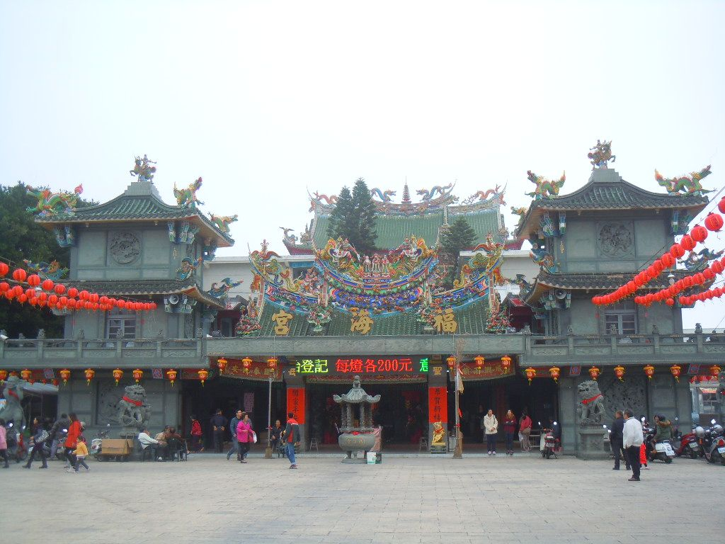 中文(繁體):王功福海宮的所在地:彰化縣芳苑鄉民生村芳漢路。